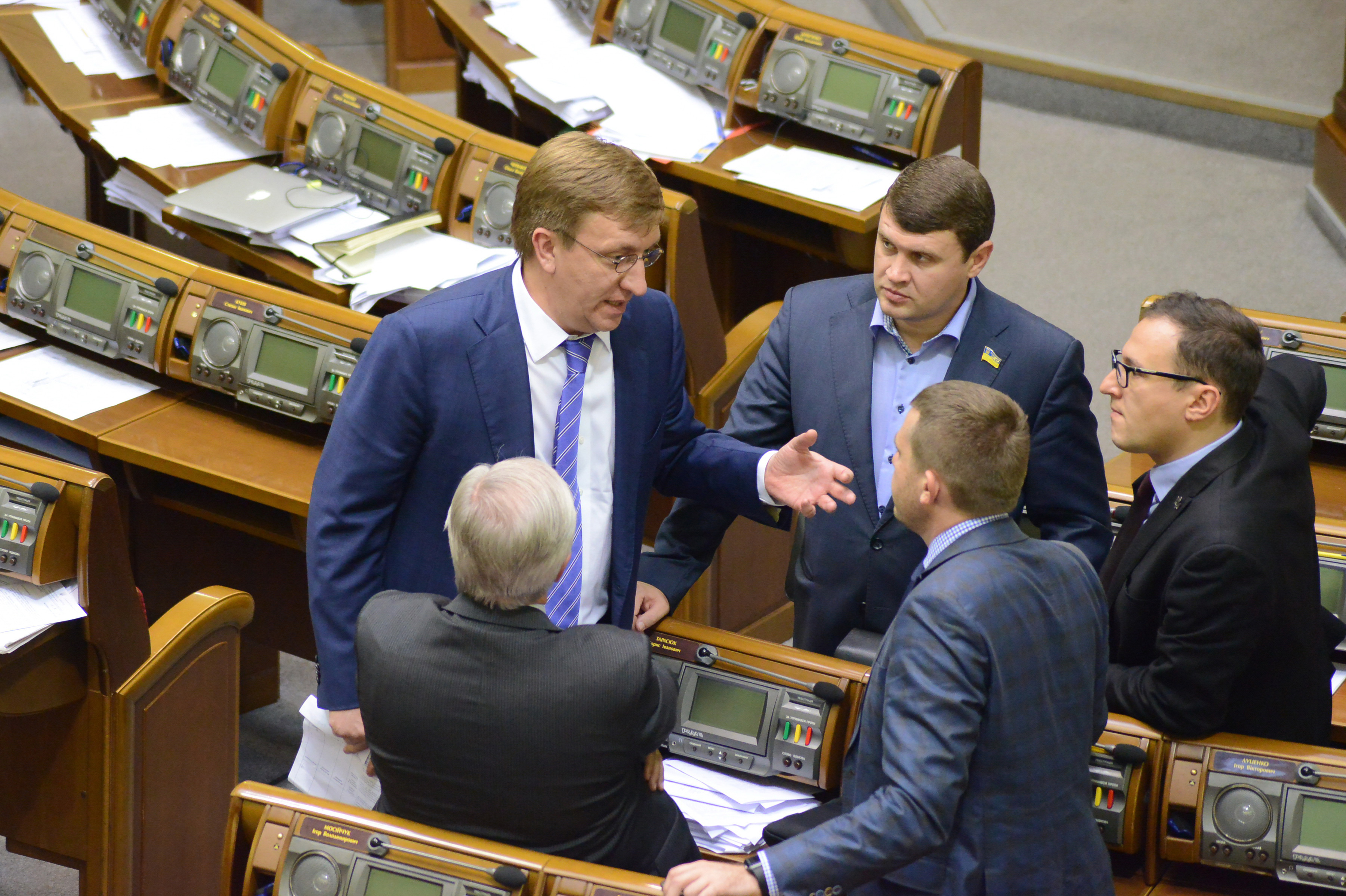 БУХАРЄВ ВЛАДИСЛАВ-ПАРЛАМЕНТ